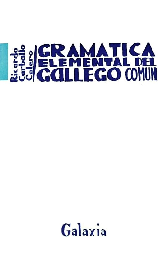 Gramática elemental del gallego común